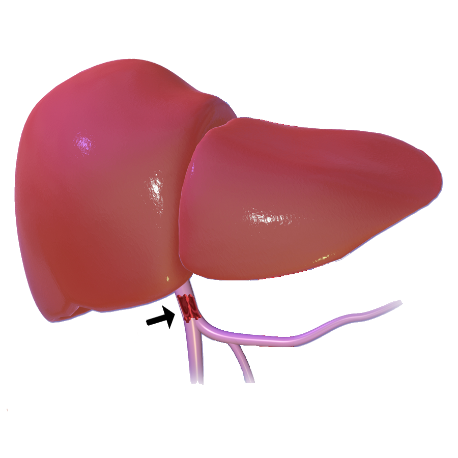 La flecha señala una trombosis de la vena porta hepática.